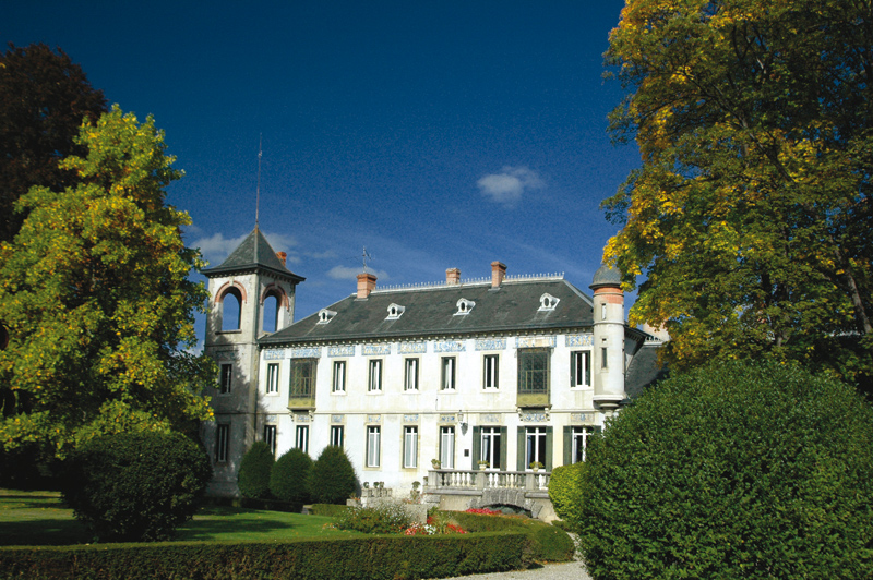 Mairie de Lavelanet (09-Ariège)